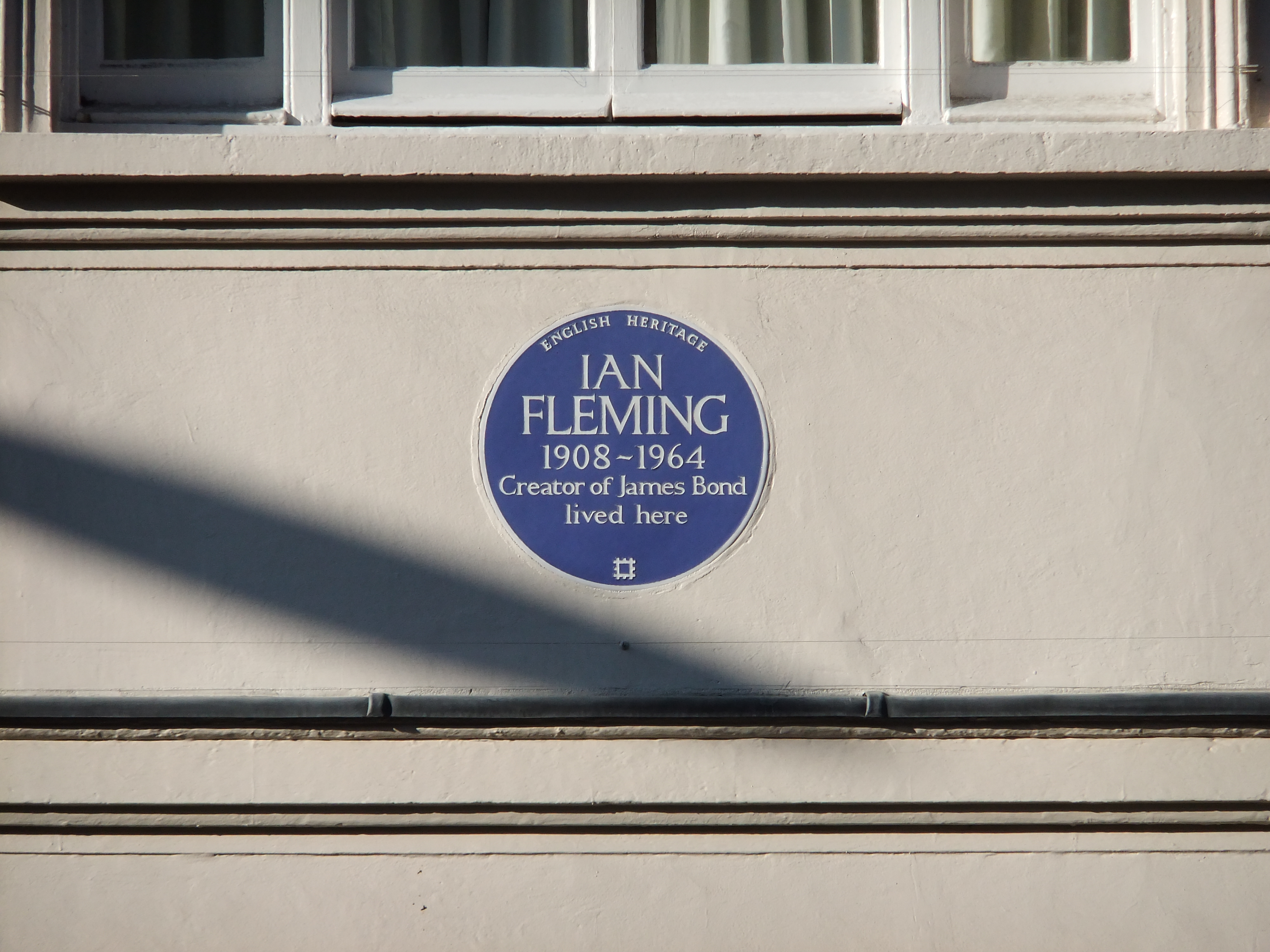 Ian Fleming blauwe plakaat Ebury Str 22